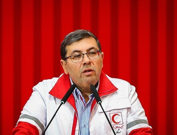 دکتر ضیایی،روز جهانی صلیب سرخ و هلال احمر